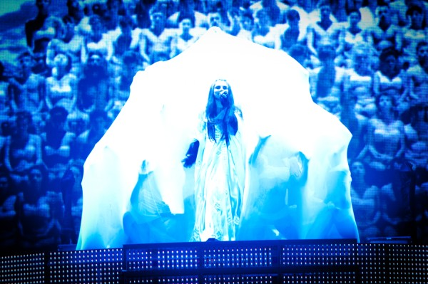 Анна Плетнёва на Концерте в Крокус Сити Холле исполняет песню Деревья